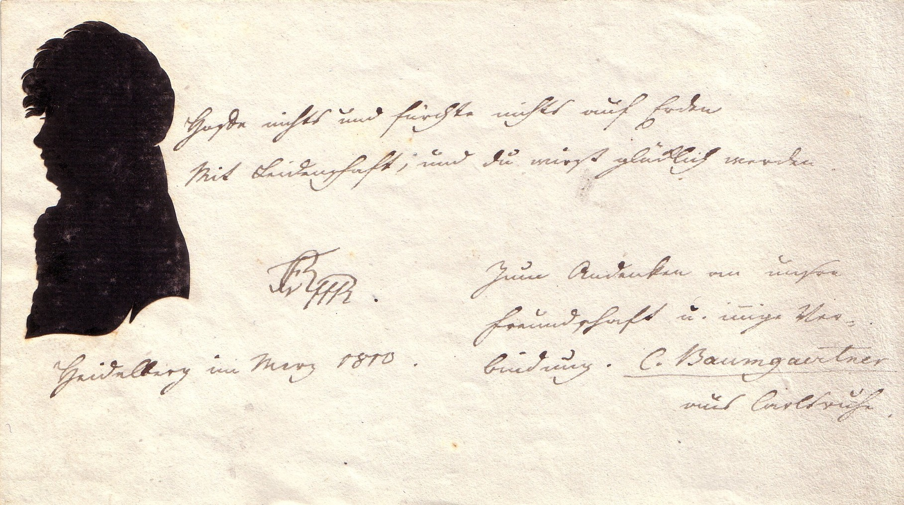 Carl Baumgärtner, Stammbuchblatt aus dem Stammbuch Carl Ferdinand Gerolt TEXT in Kurrentschrift Hoffe nichts und fürchte nichts auf Erden Mit Leidenschaft; und du wirst glücklich werden. [Johann Gottfried Seume] Zum Andenken an unsere Freundschaft u. innige Ver- bindung. C.Baumgartner aus Carlsruhe. Heidelberg im Merz 1810.